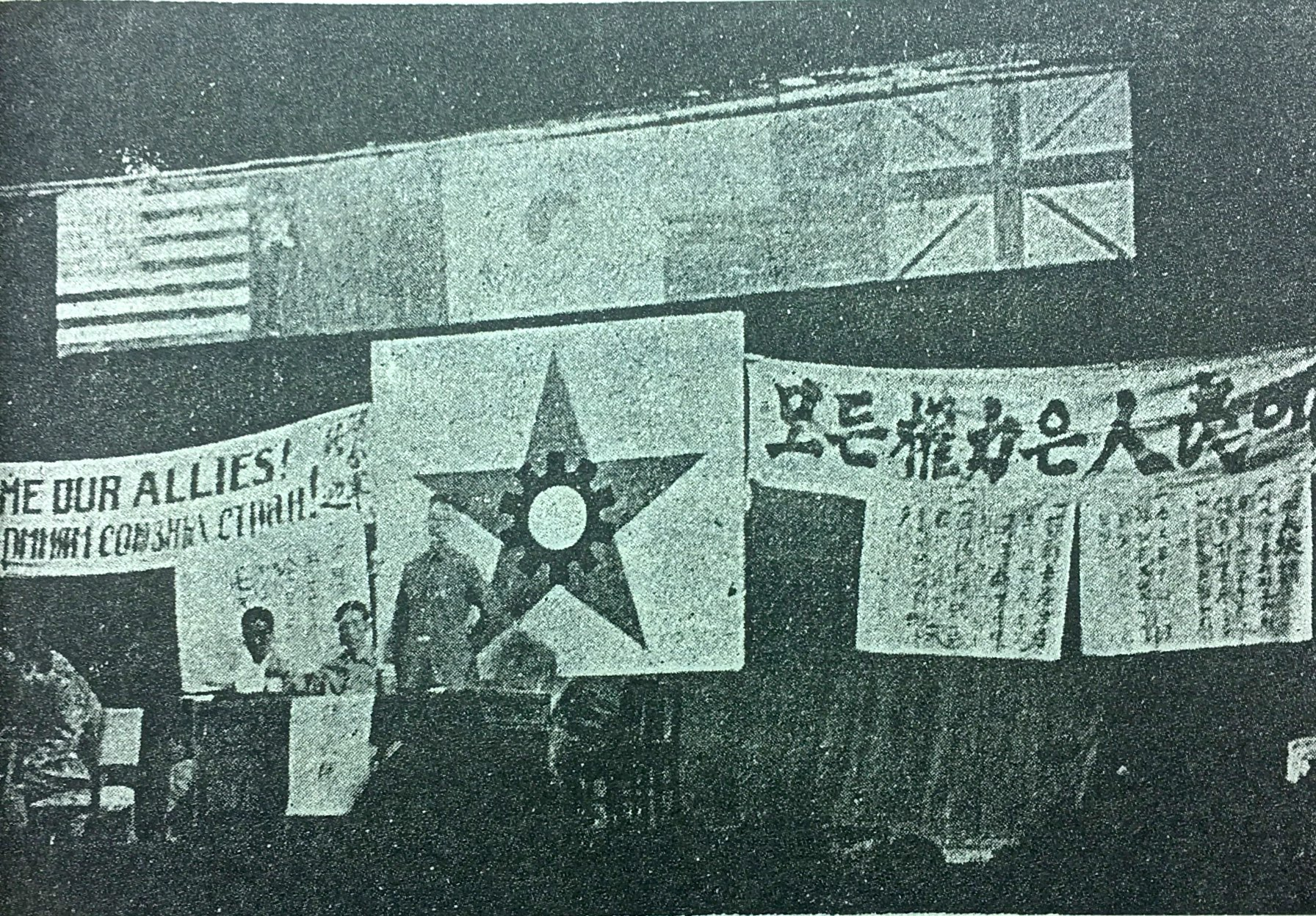 朝鮮労働組合全国評議会（全評、조선노동조합전국평의회）結成大会